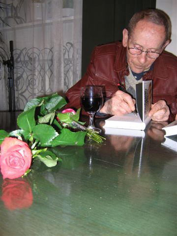 Tadeusz Konwicki (1926-2015), Polish writer and scenarist